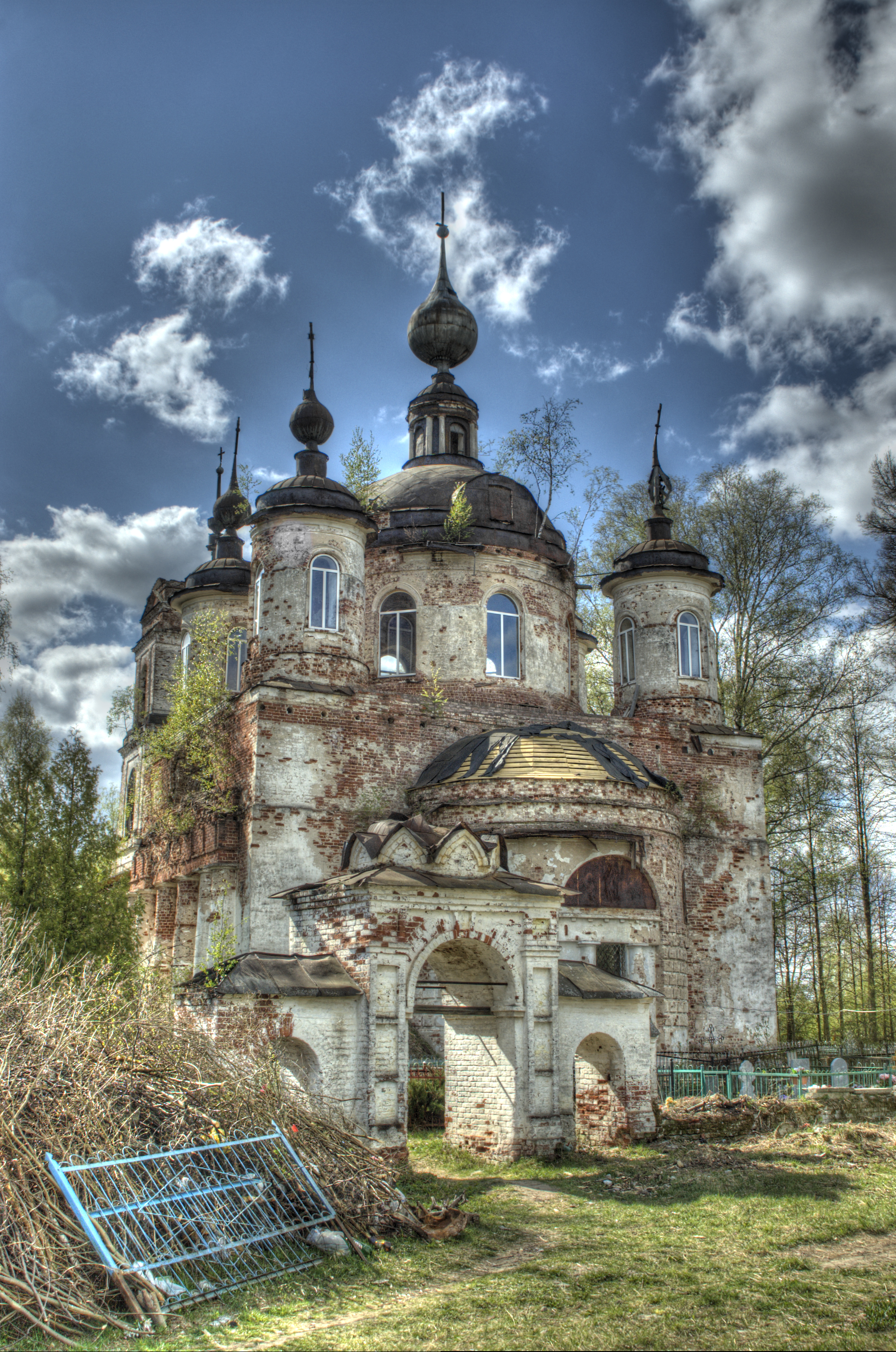 Церковь Воскресения: Старинский Погост, Судогдский район, Владимирская область